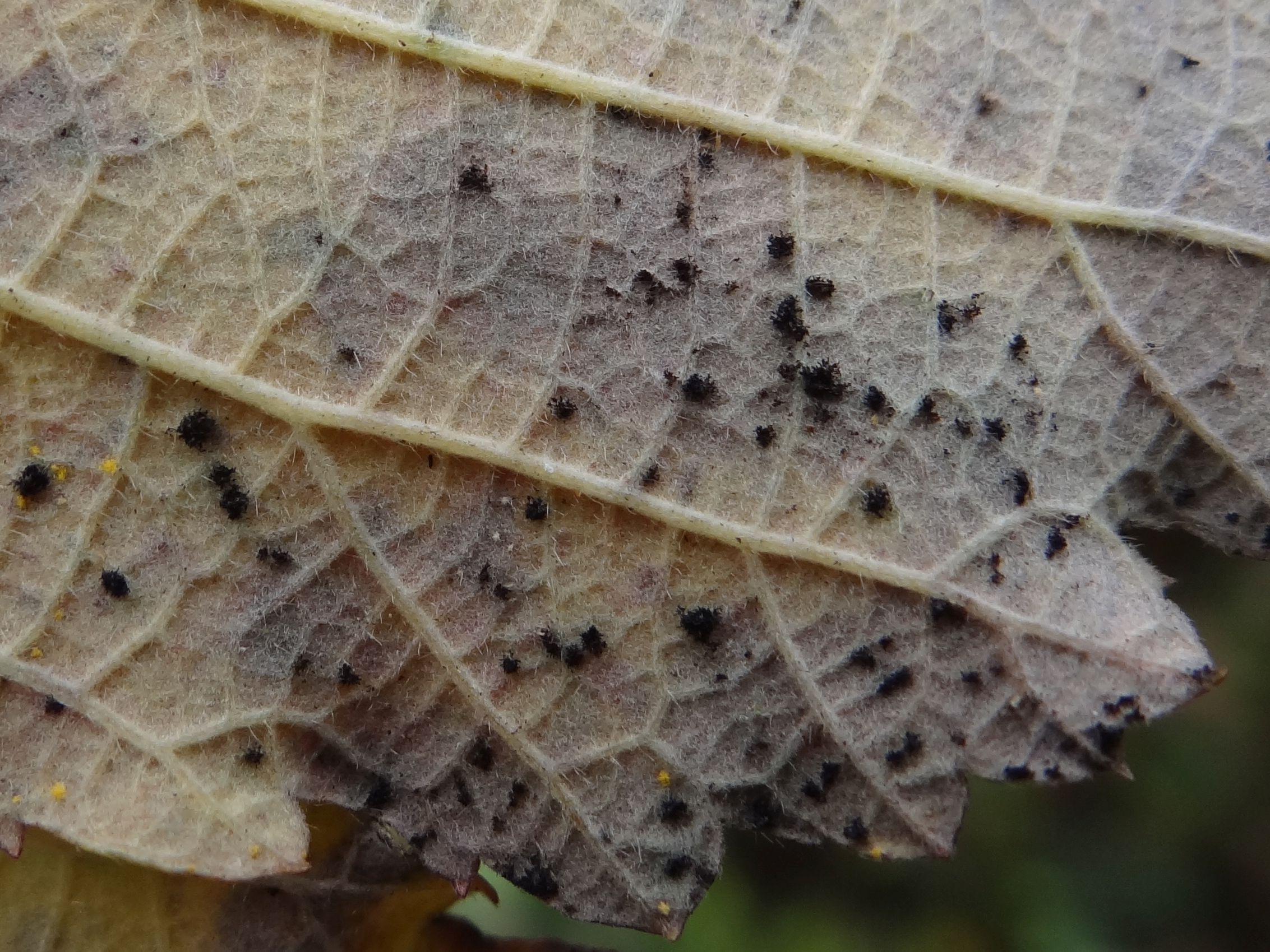 Phragmidium violaceum on leaf Rosa sp. (telum)